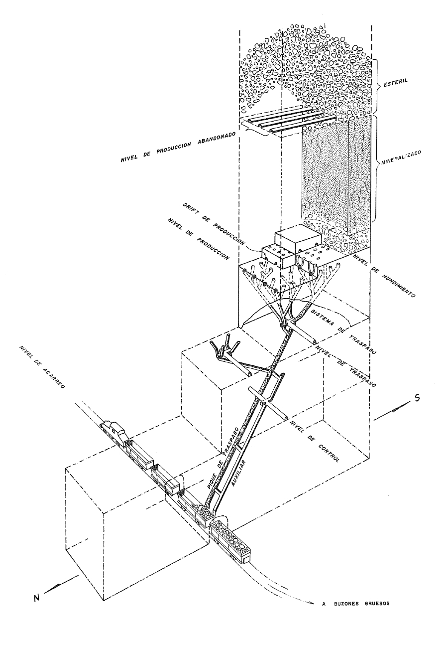 Bloque diagrama mostrando el sistema de explotación y traspaso de mineral en la mina El Teniente